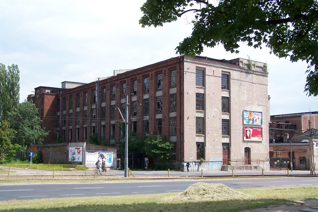 Fabryka Karola Eiserta (Norbelana) ul. Żeromskiego